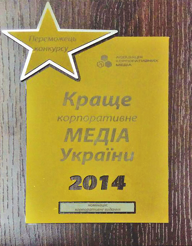 Сертифікат Гран-прі у номінації «Краще корпоративне медіа України 2014» отриманий газетою «Поштовий вісник» за перемогу у щорічному конкурсі Асоціації корпоративних медіа України